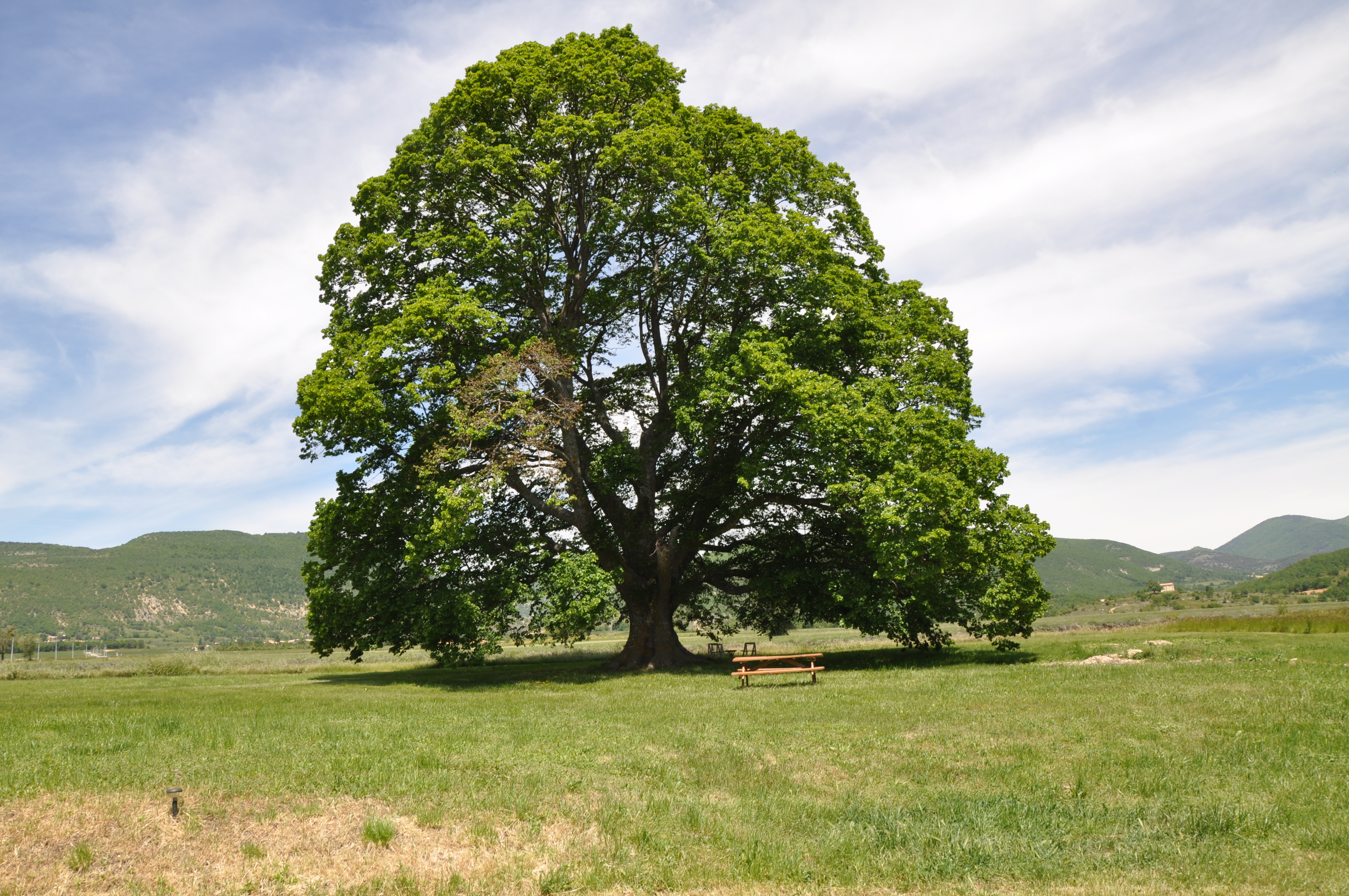 Gros Tilleul à La Rochegiron (Alpes-de-Haute-Provence, France).